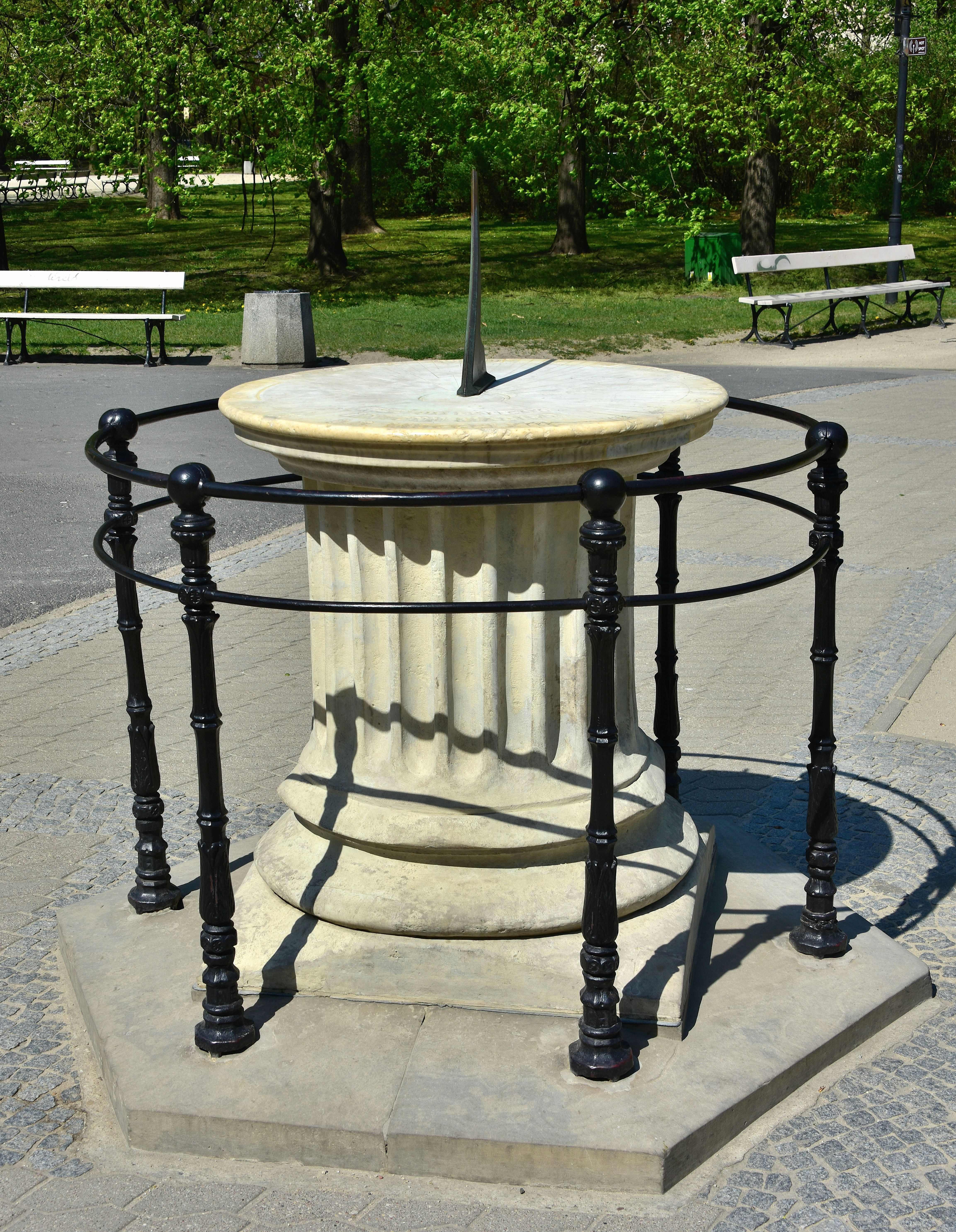 Zegar słoneczny w Ogrodzie Saskim